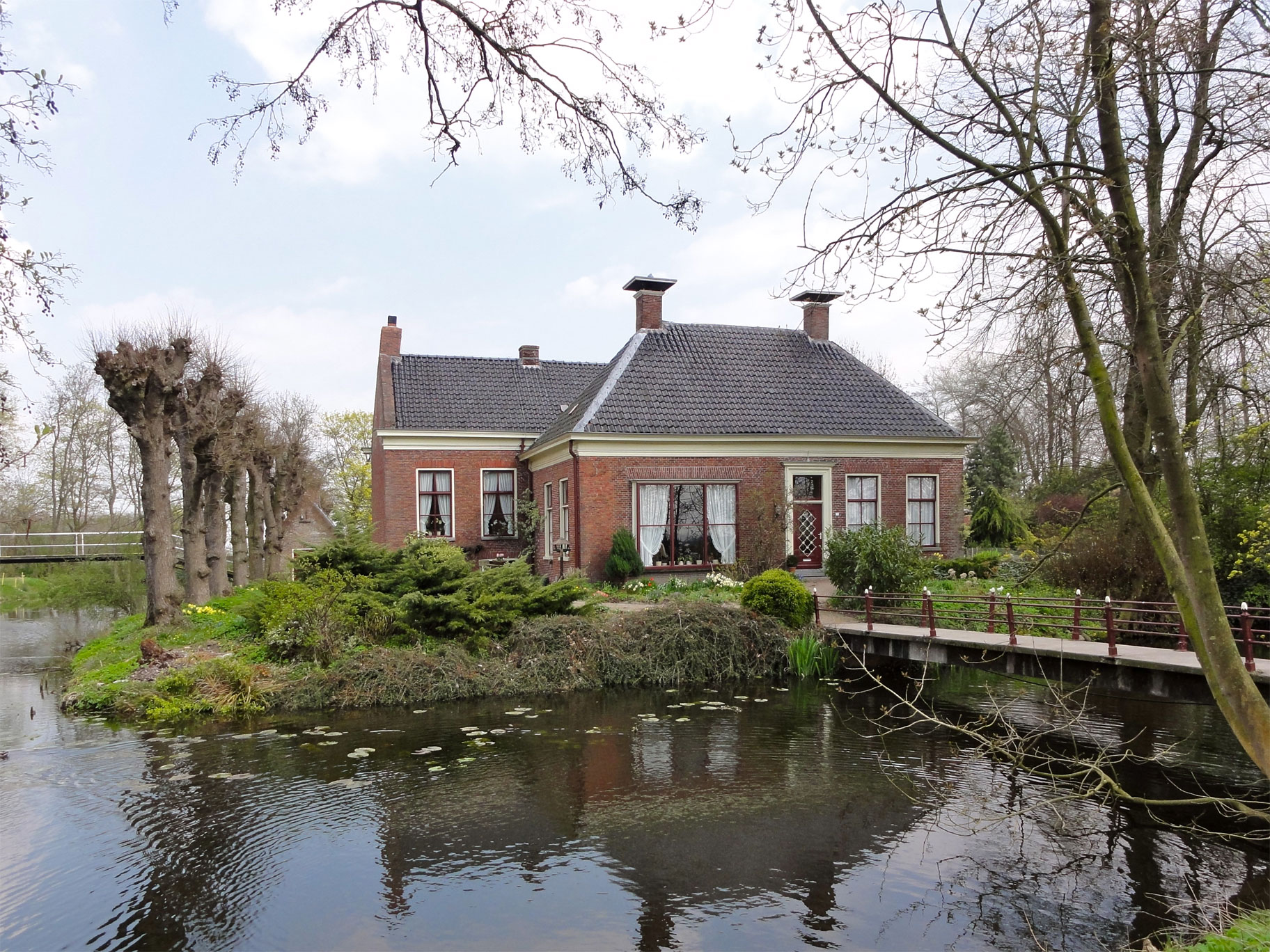 Voorzijde van de Alberdaheerd nabij 't Zand